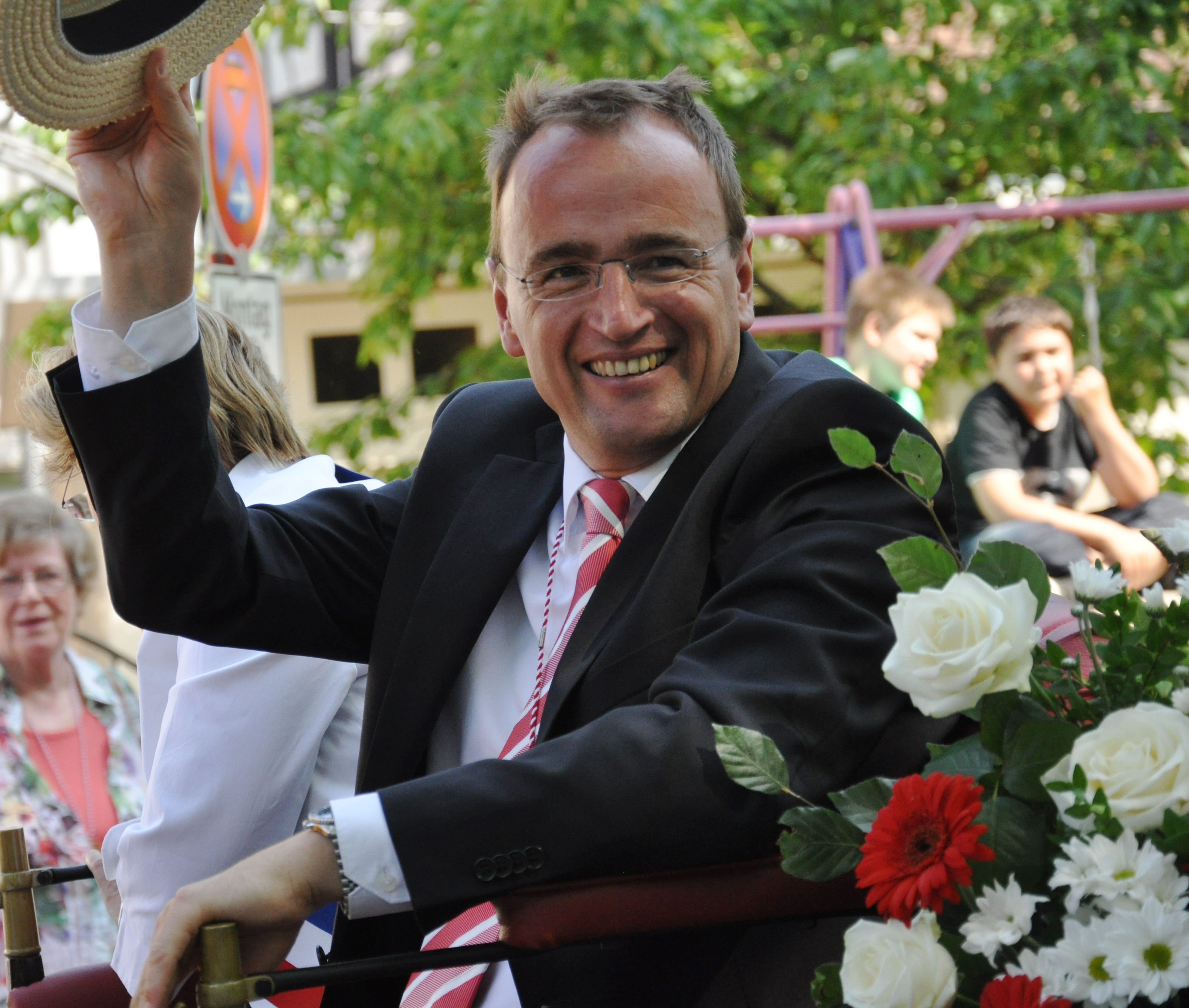 Welfenfest Weingarten, Festzug 2013: Der Wagen mit Oberbürgermeister Markus Ewald beschließt den Festzug.